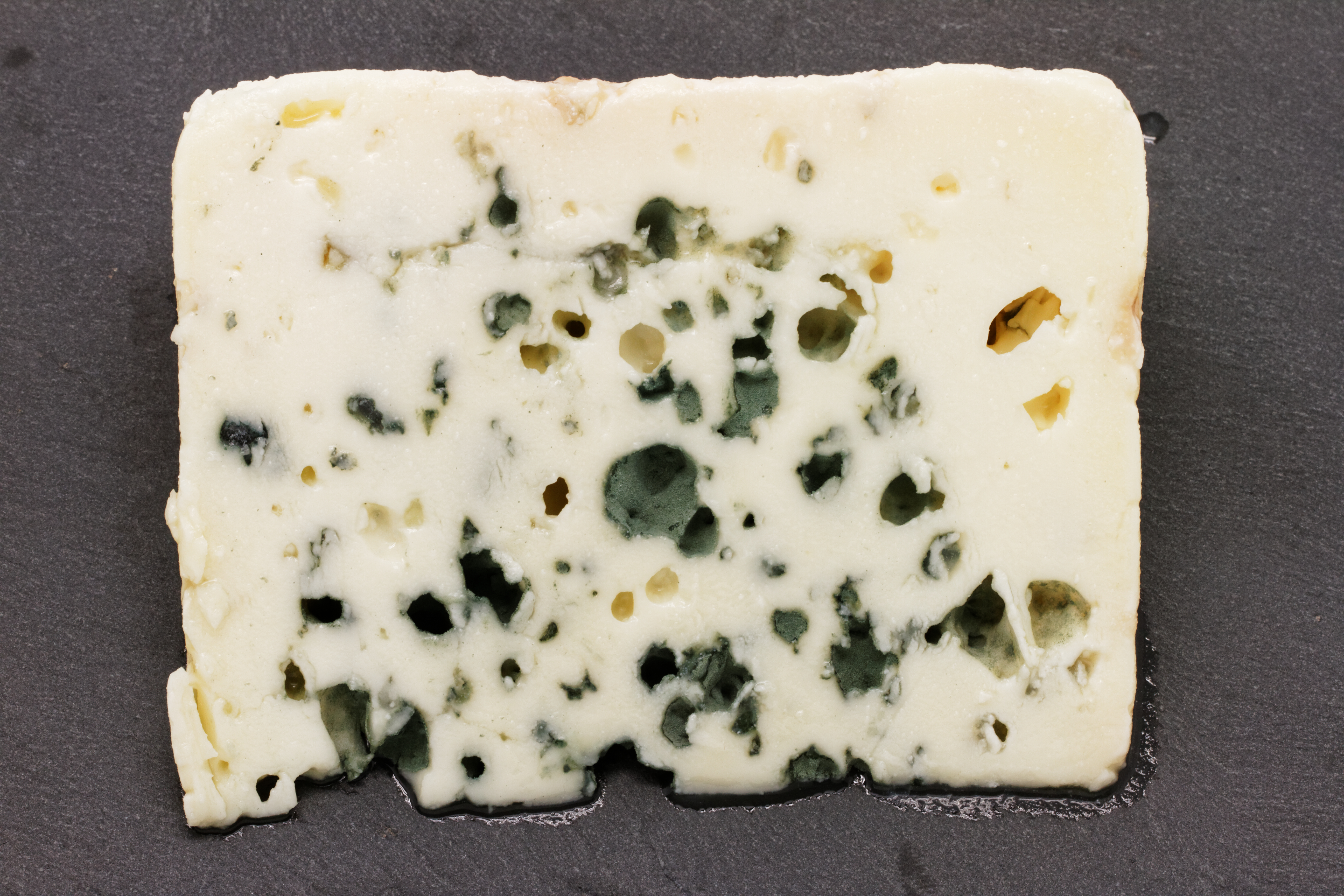 Du Roquefort, fromage de l'Aveyron.